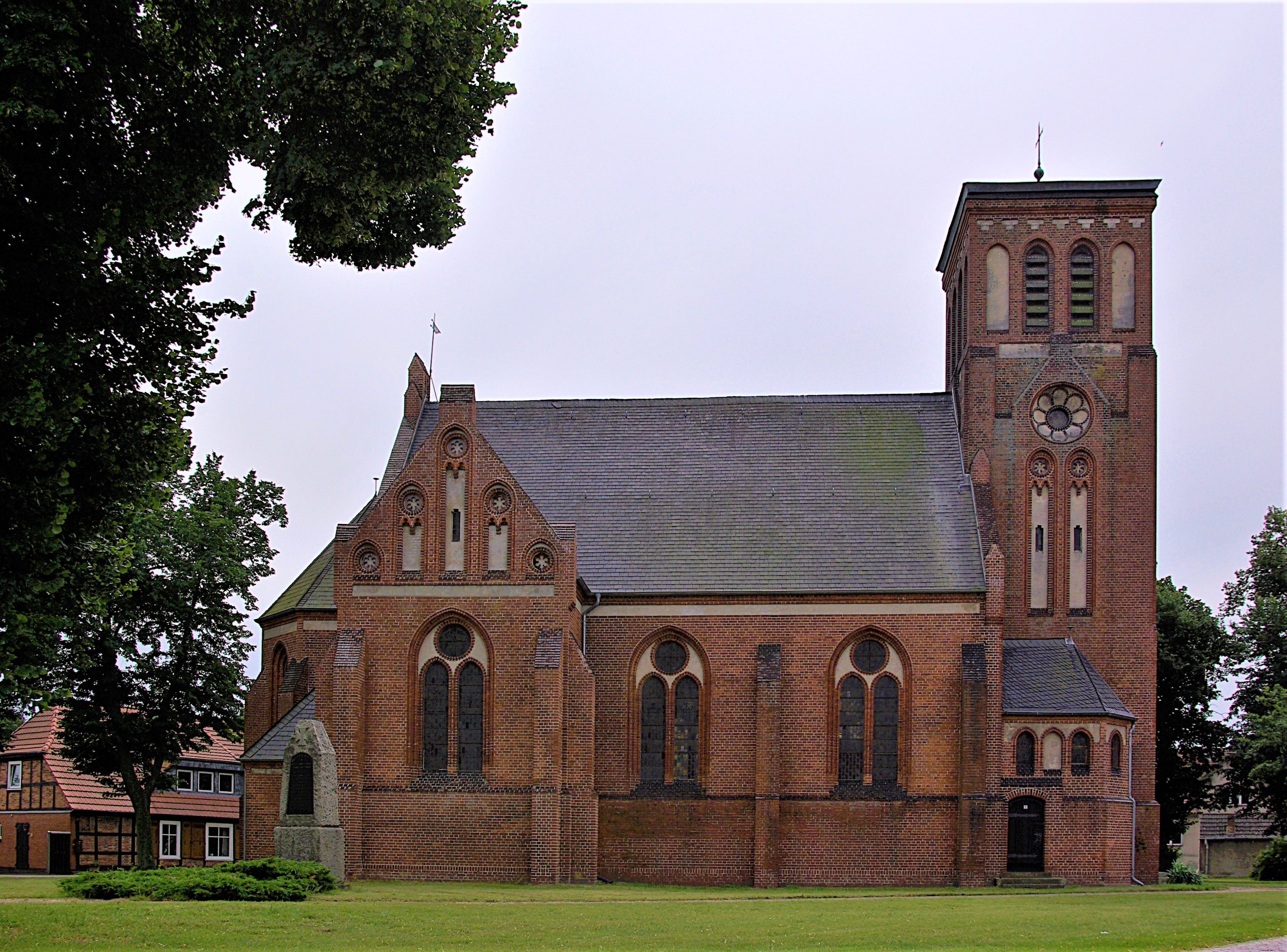 Bad Wilsnack, Ortsteil Groß Lüben in Brandenburg. Die Kirche wurde 1904 errichtet. Sie steht unter Denkmalschutz.